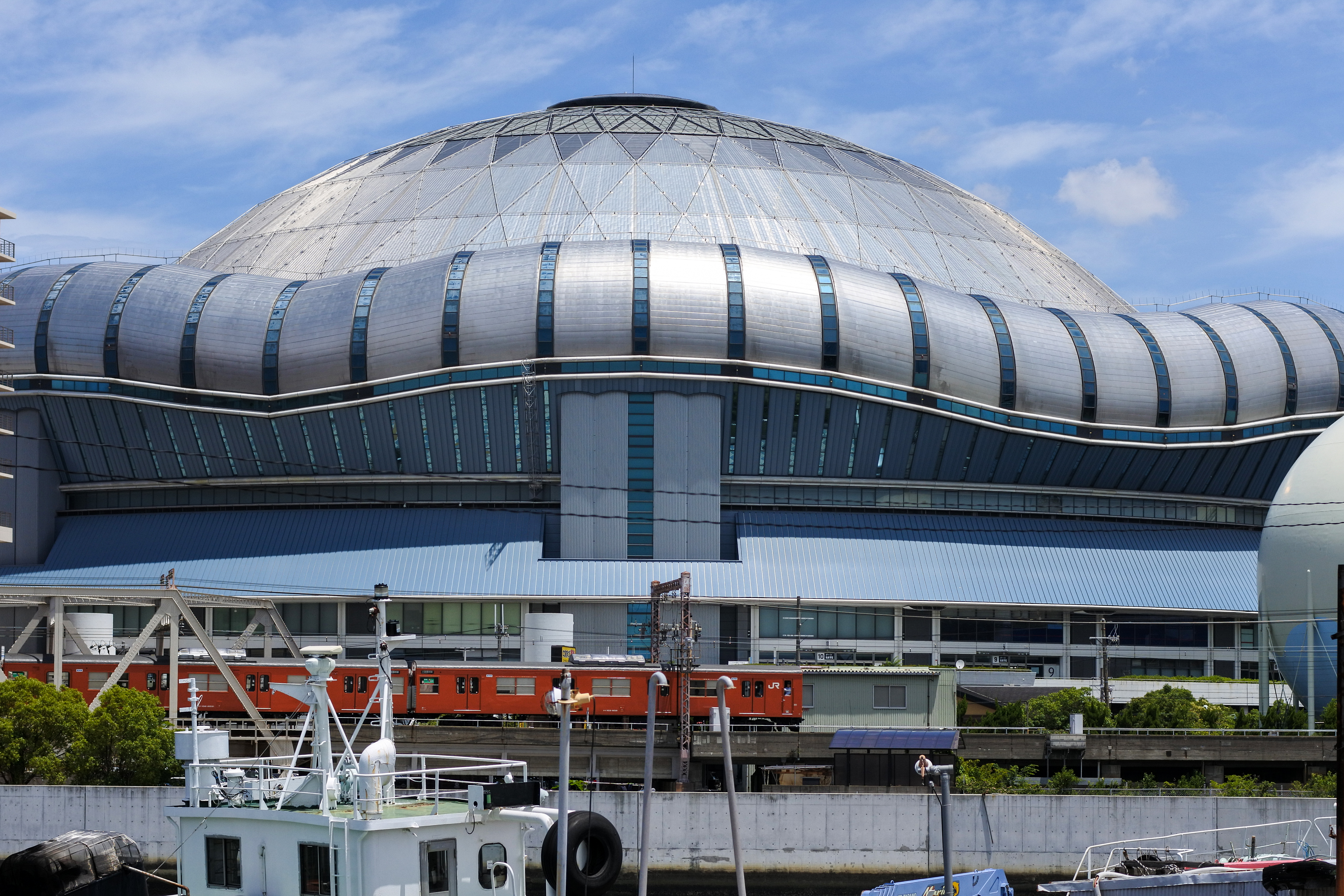 Jul 2, 2016 at 11:41, Osaka 大正区